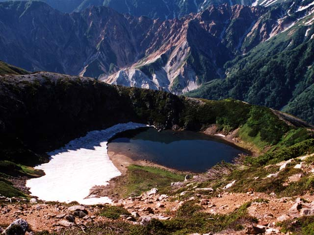 Charco Washiba, desde cima de Pico Washiba, Sierra Hida, Japon. Foto por usario Inti-sol, julio de 2000. 鷲羽池。鷲羽岳山頂より投稿者が撮影。2000年7月。